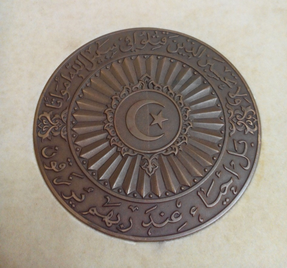 Médaille de chahid donnée à la famille